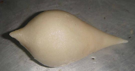 नेपाली: योमरी